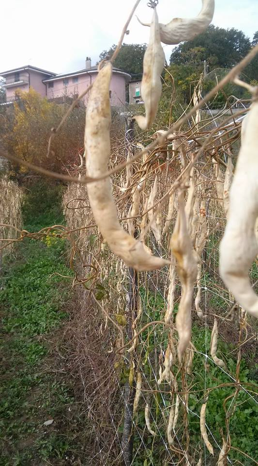 File di fagioli della Regina secchi